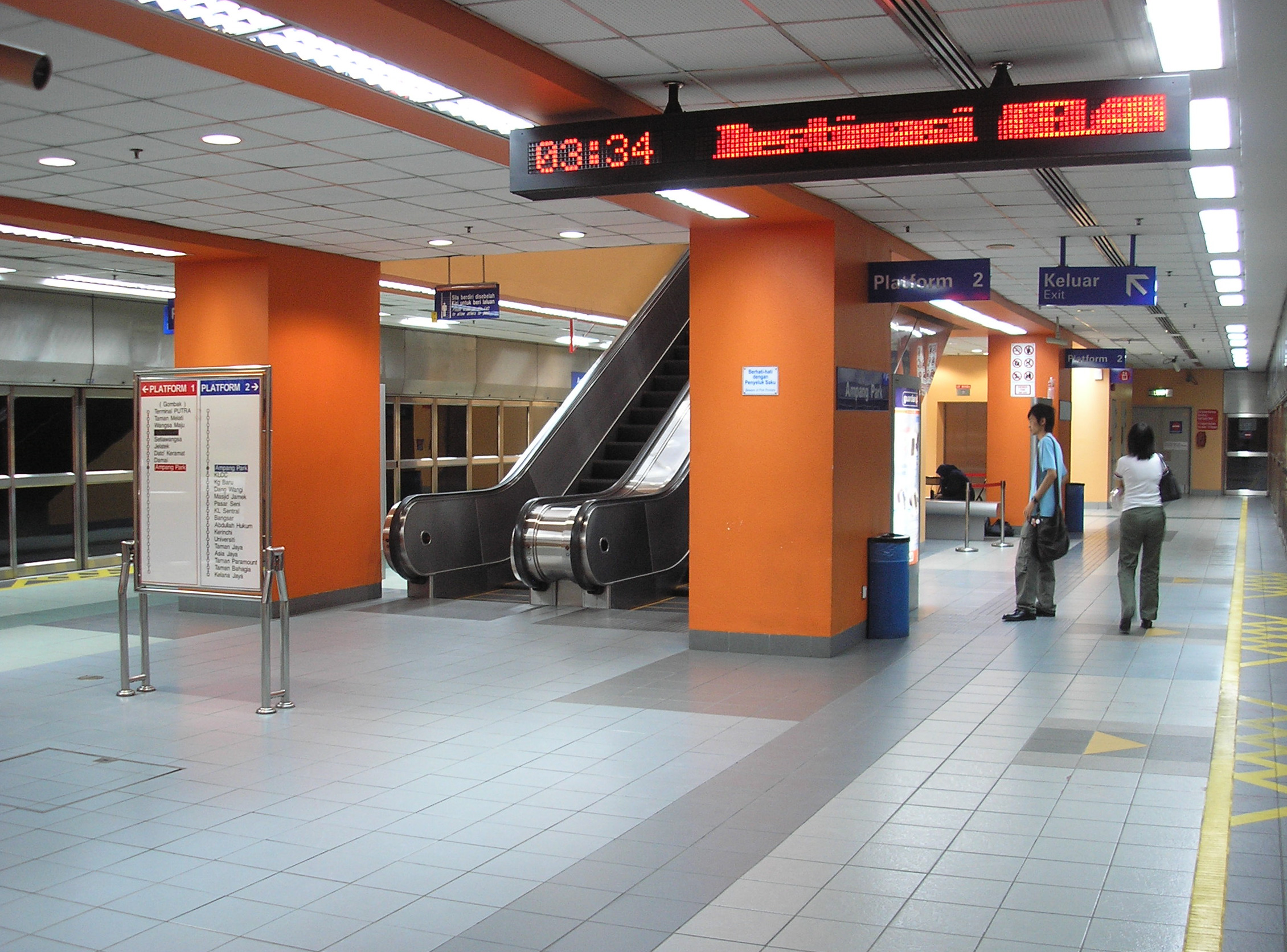 The Ampang Park LRT station (Kelana Jaya Line), Kuala Lumpur, Malaysia.